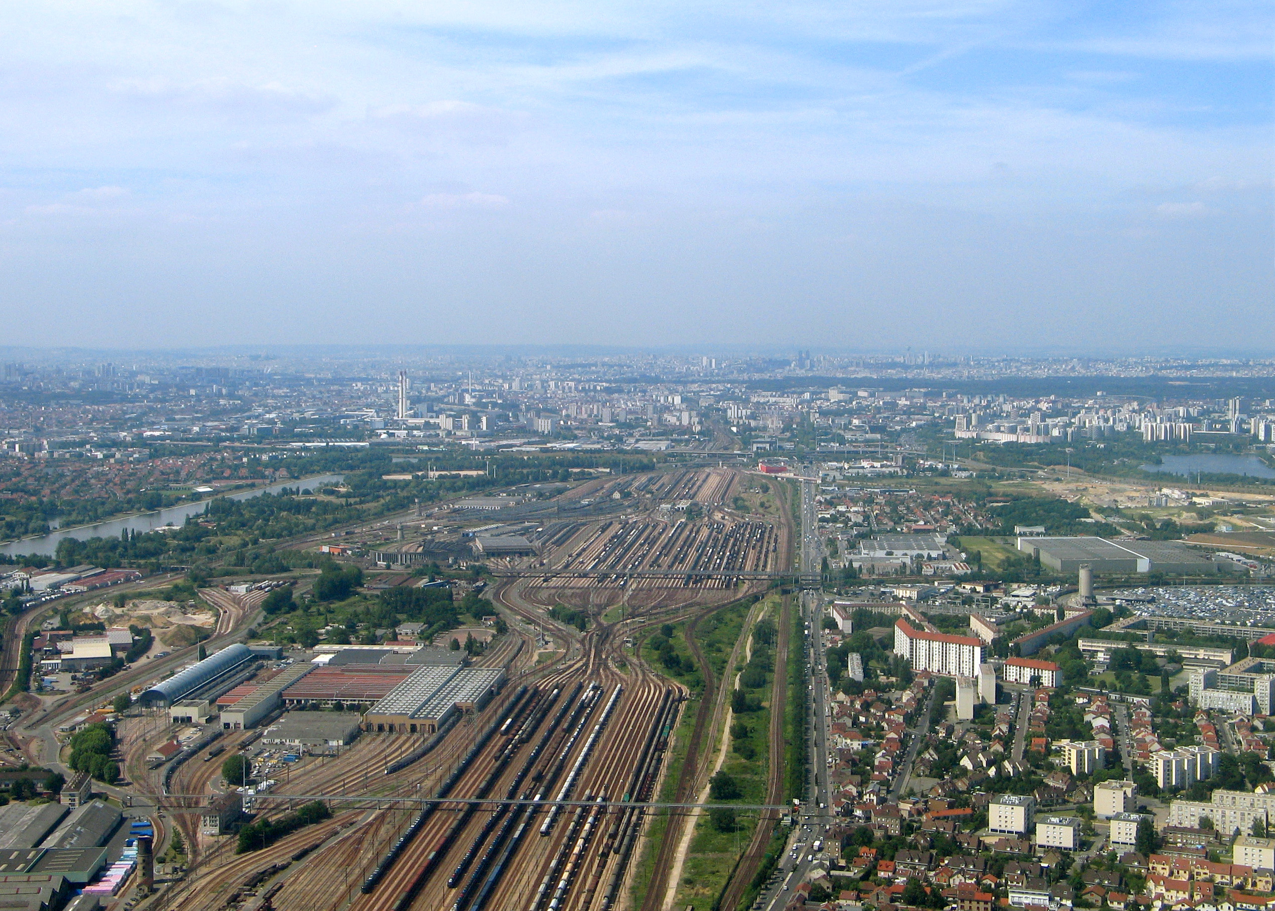 la gare de triage de Villeneuve-saint-Georges vue d'avion